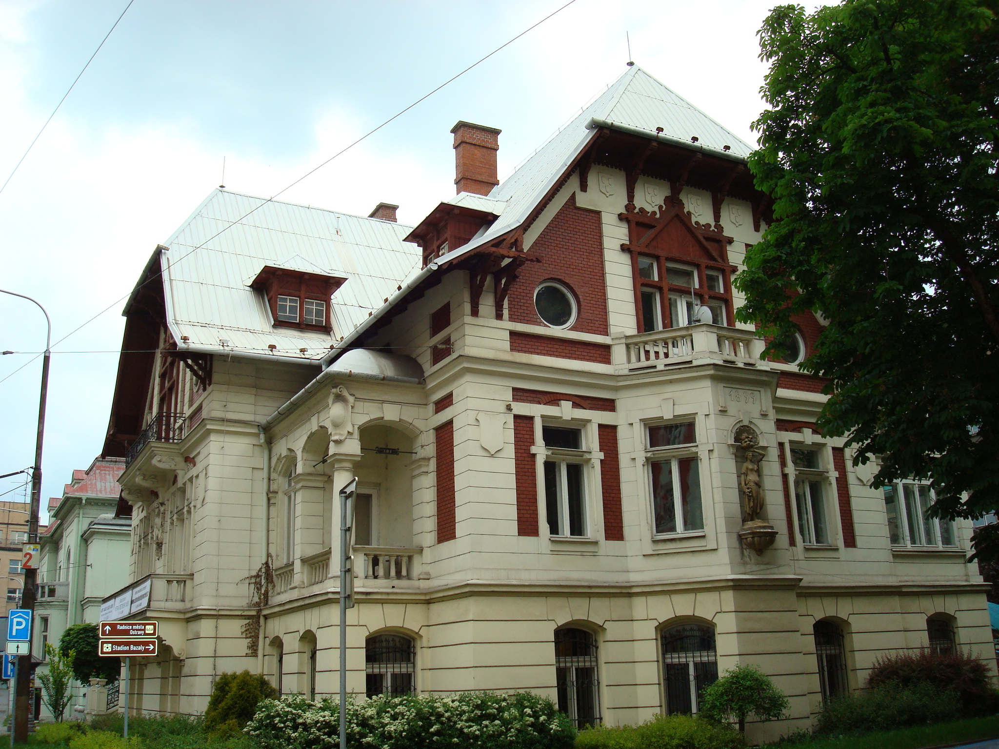 Vila Hanse Ulricha v Moravské Ostravě.